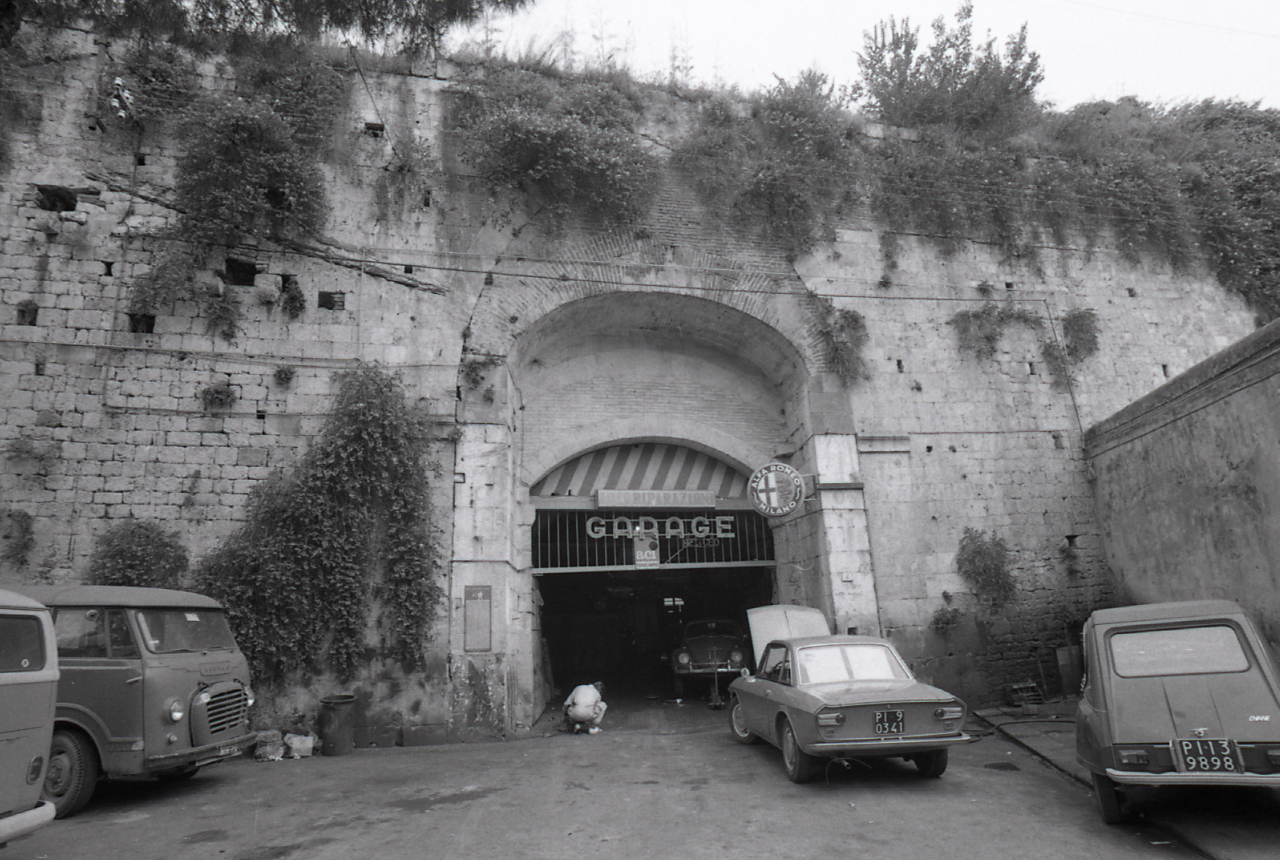 Località non identificata [Pisa?]. Officina meccanica: interni ed esterni. Servizio fotografico : Italia, 1975 / Paolo Monti. - Strisce: 2, Fotogrammi complessivi: 7 : Negativo b/n, gelatina bromuro d'argento/ pellicola ; 35 mm. - ((Sul portanegativi: N[I]K[MA]T FP4. - La serie è identificata da Monti con segni grafici e distinta dalla precedente. - Confronta scheda 2755Lpbn23A-28A. Il provino a contatto del fotogramma n. 22A manca. - Occasione: Documentazione per la pubblicazione: Battisti Eugenio, "Filippo Brunelleschi", Milano, Electa, edizione italiana, 1976. - Fonte: Agenda di Paolo Monti: Leica 1501-3000 Controllo numerazione (1950-1978), presso Archivio Paolo Monti